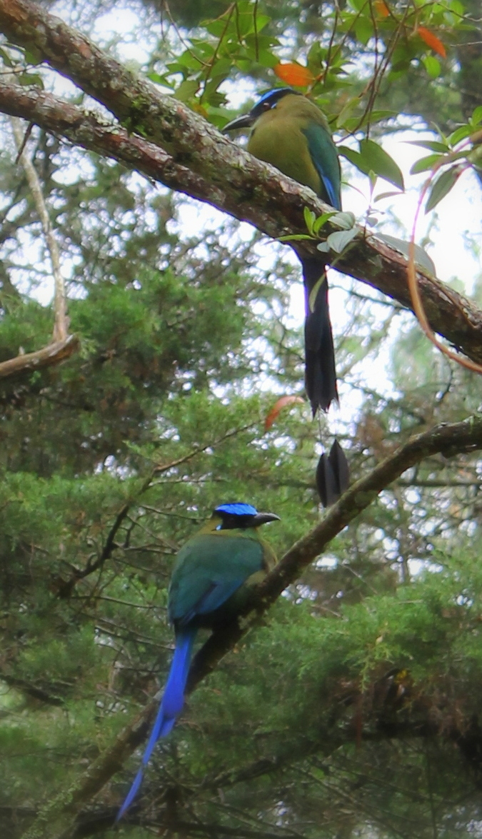 Momotus Momota, Santa Elena Antioquia - Colombia Bosque montano de los Andes del norte, 220 msnm